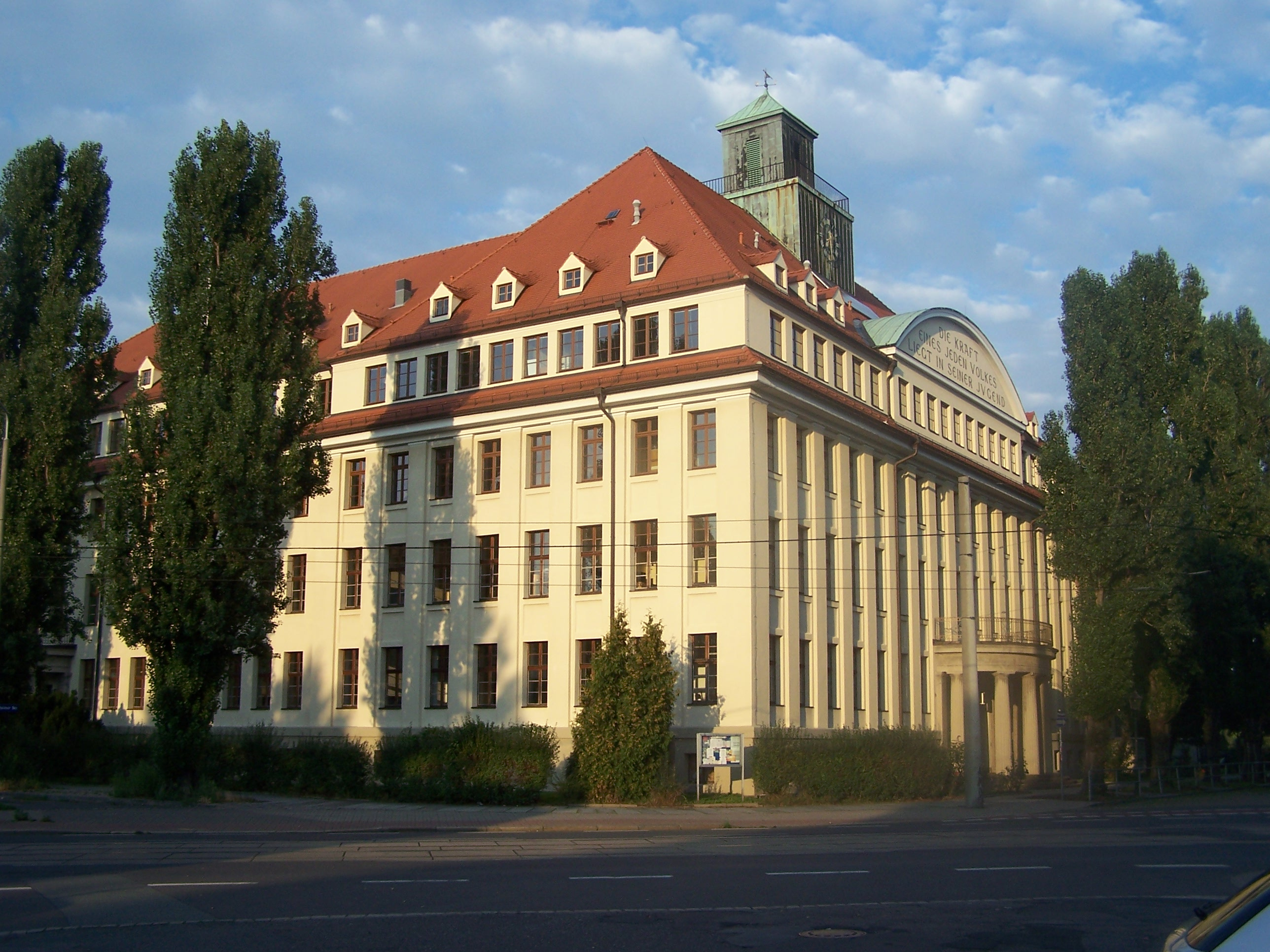 Pestalozzi-Gymnasium in Dresden-Pieschen, Architekt: Hans Erlwein